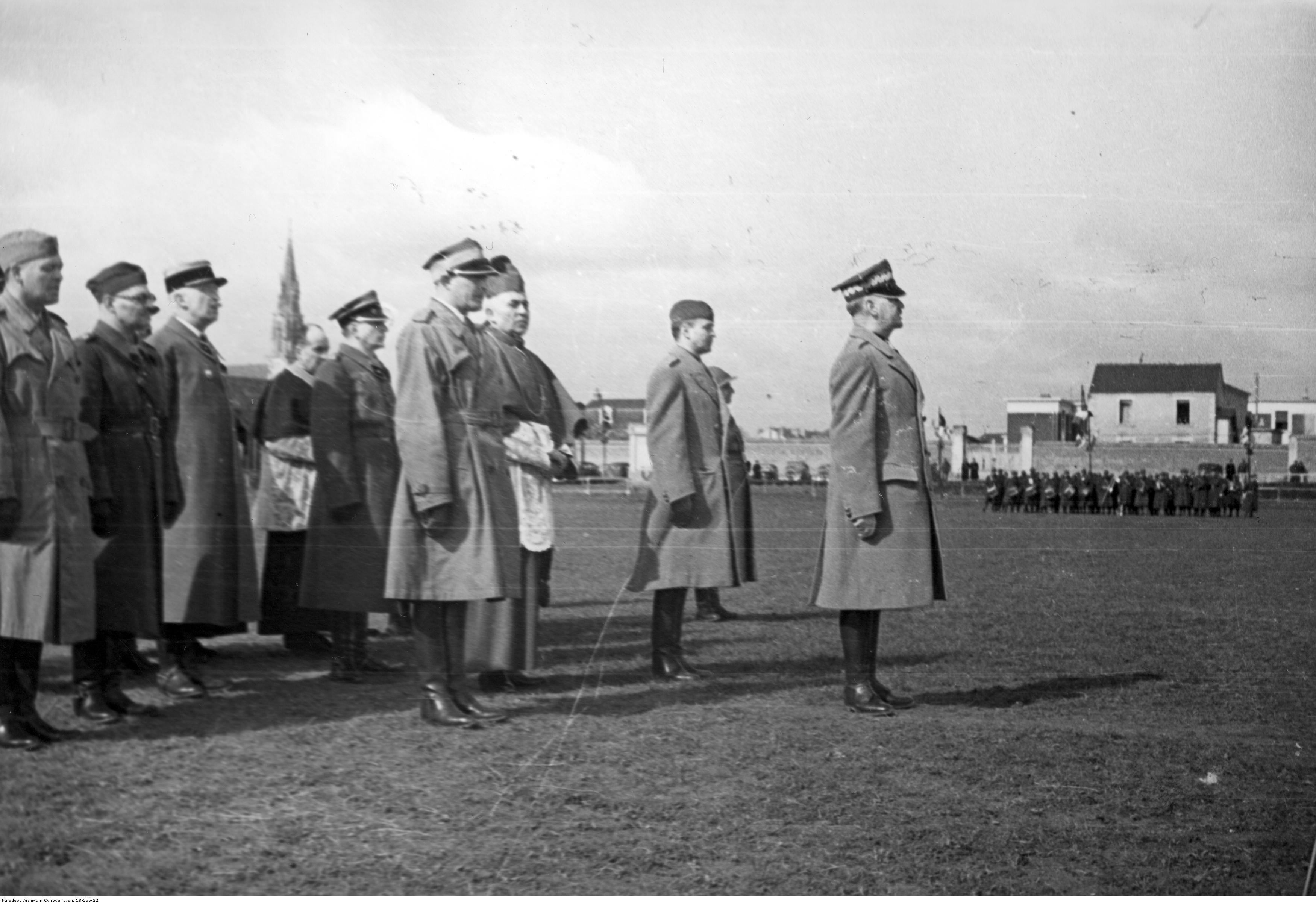 Uroczystość wręczenia sztandarów oddziałom saperów polskich we Francji; 30 marzec 1940 r. Przemawia gen. Władysław Sikorski. Od prawej: gen. Władysław Sikorski, płk. dypl. Aleksander Kędzior, biskup polowy Józef Gawlina. Z lewej gen. Wacław Wieczorkiewicz. Archiwum Fotograficzne Czesława Datki. Sygnatura: 18-255-22